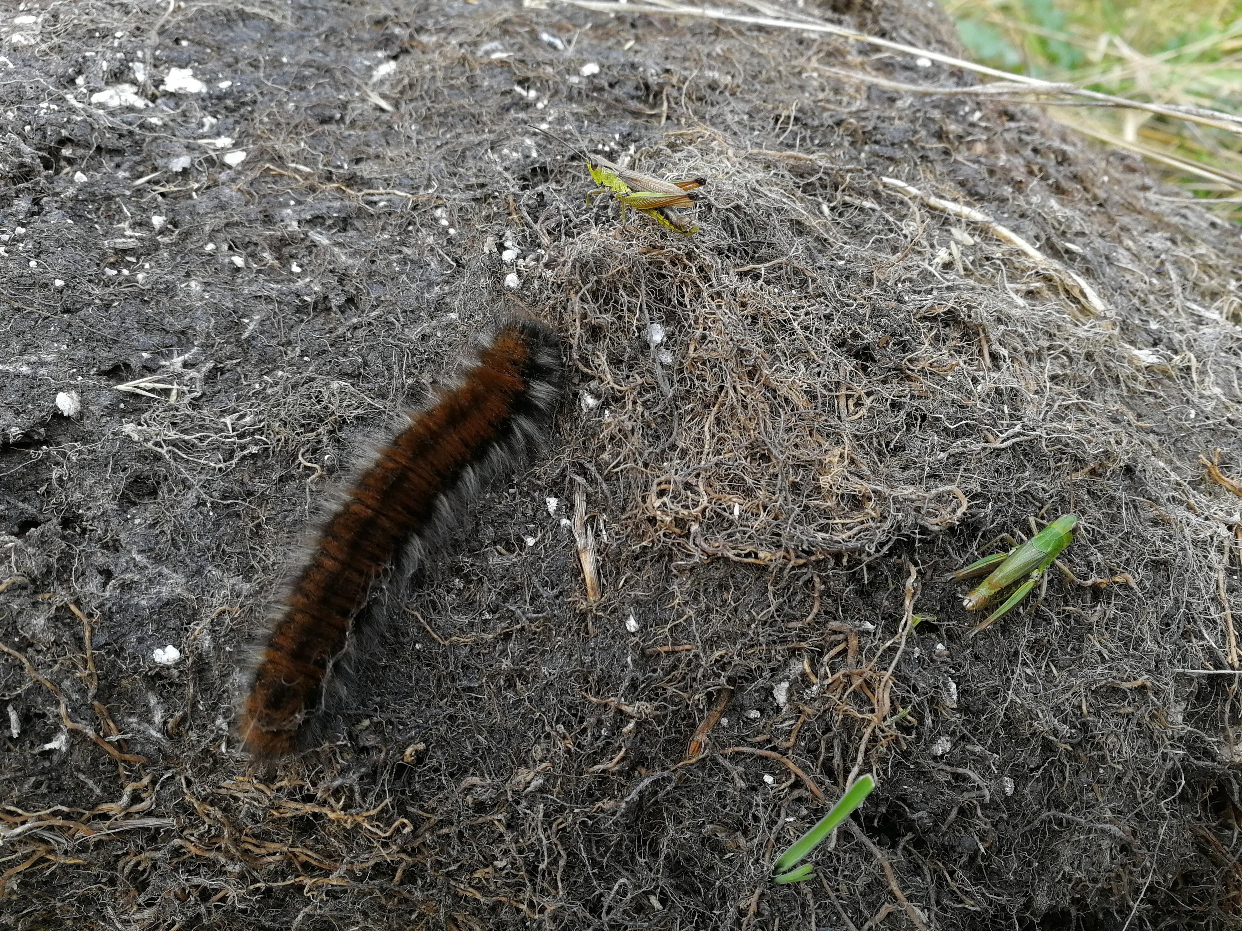 zvířata v PP Kališťské louky a mokřady